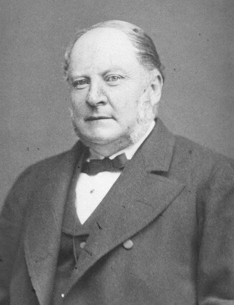 Med. professorn Per Henrik Malmsten